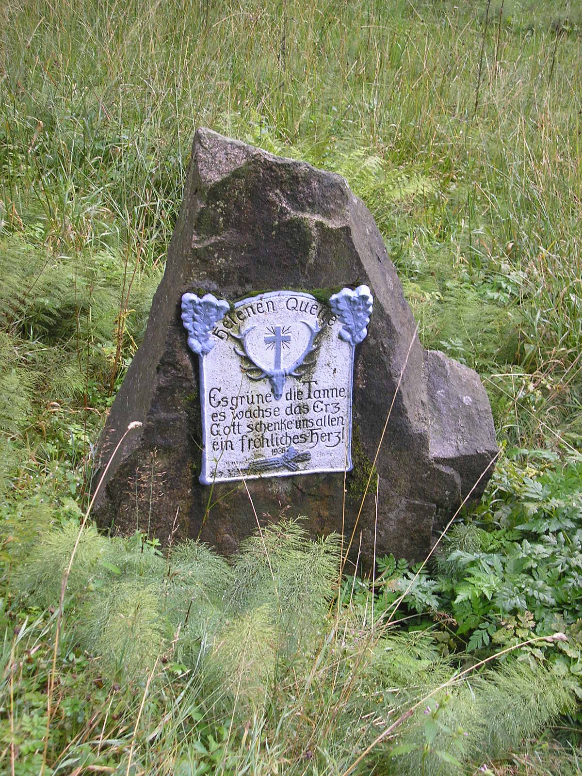 Gedenkstein an der Helenenquelle im Schortetal bei Ilmenau (Thüringer Wald).